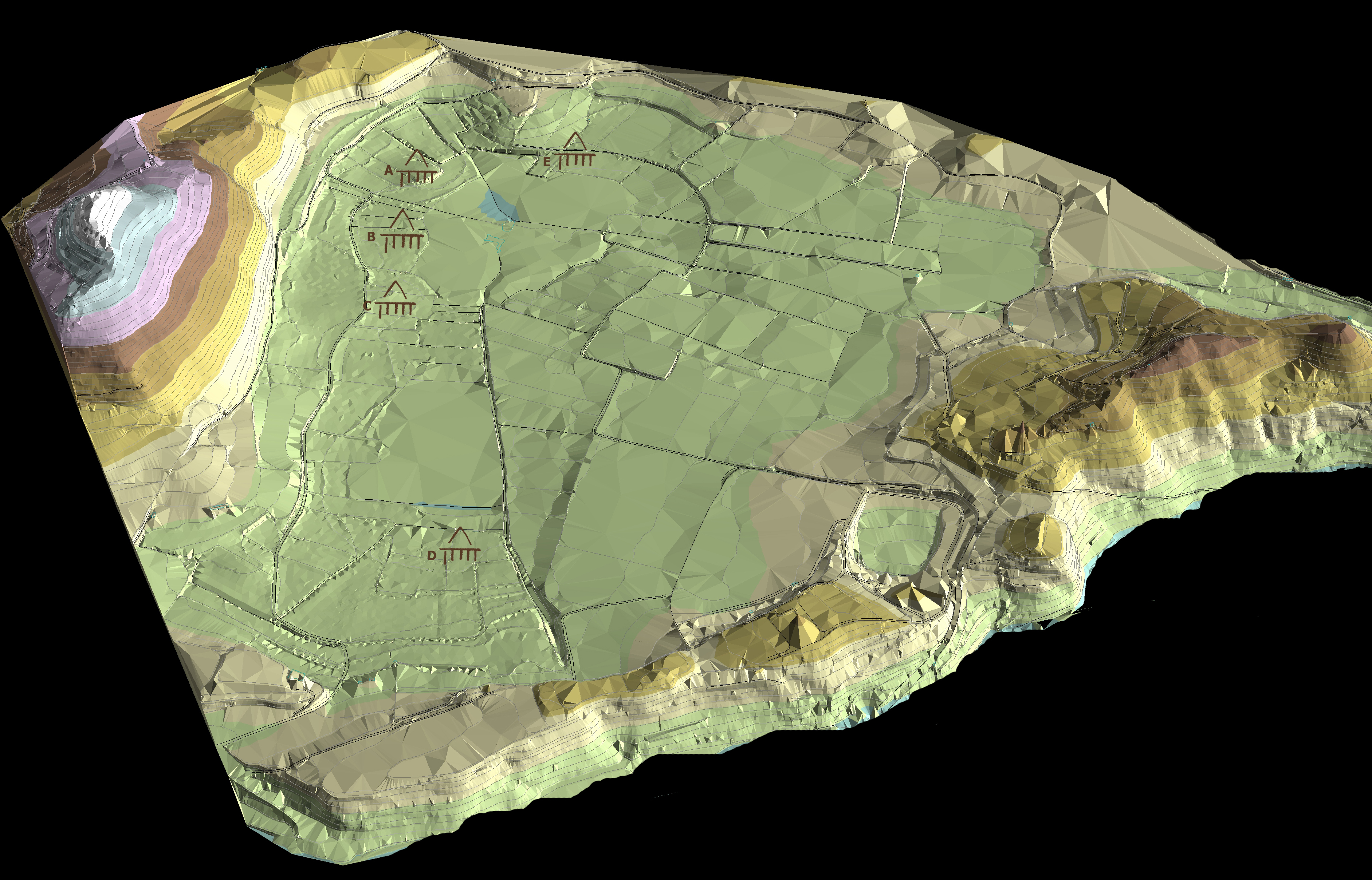 Lucone. Cartografia in 3d con il posizionamento dei siti palafitticoli.